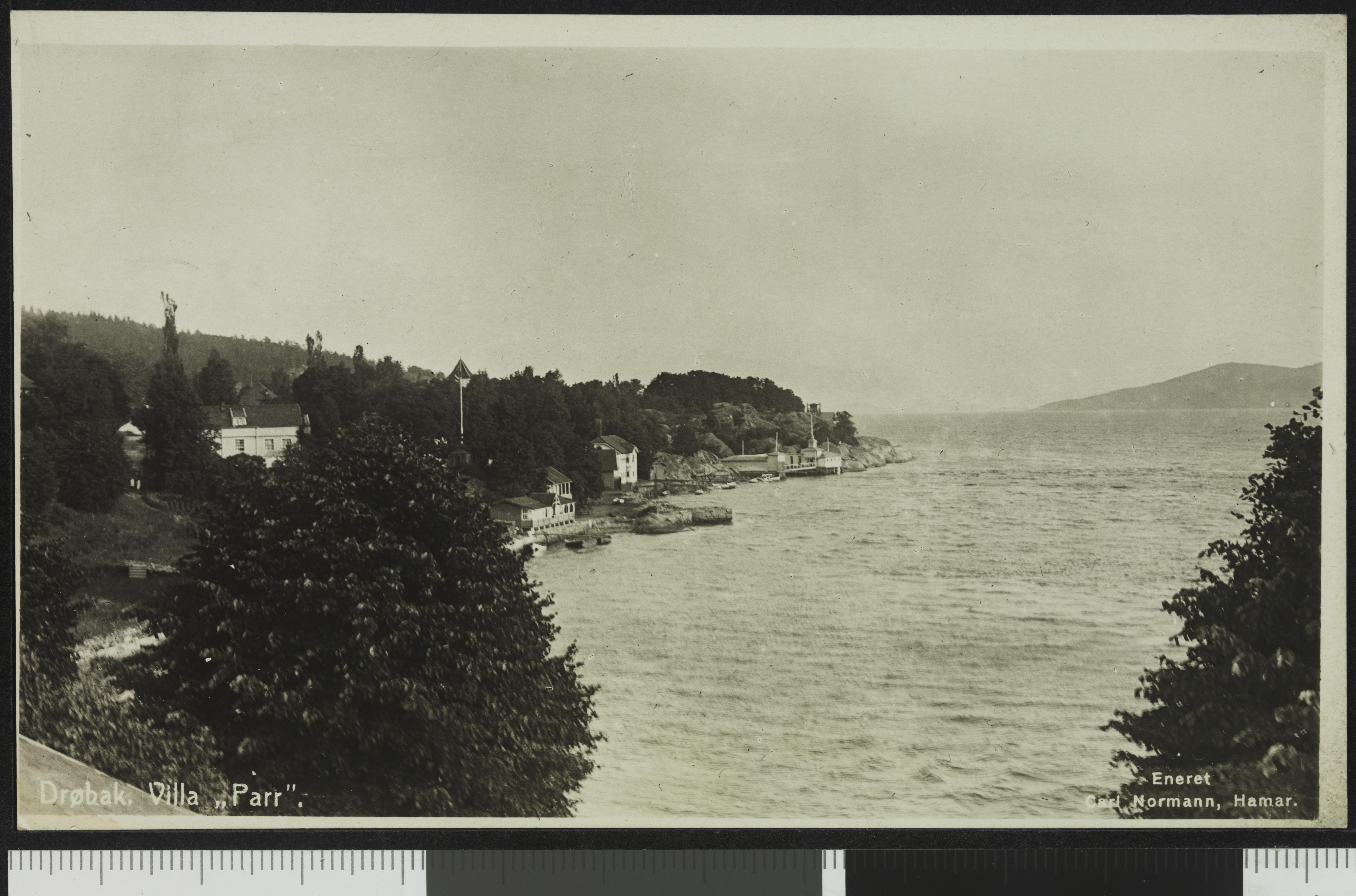 Bildet er hentet fra Nasjonalbibliotekets bildesamling Drøbak, Frogn, Akershus